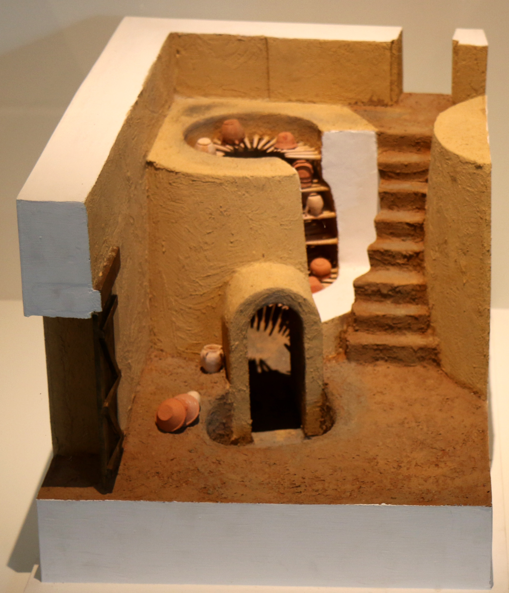 Maquette en résine du four à barre au 1/10 qui se trouvait dans l'atelier du quartier de Sainte-Barbe à Marseille, XII {e siècle.